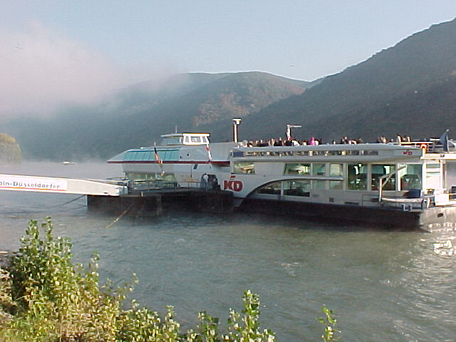 Fahrgastschiff Enterprise am Anleger Bacharach